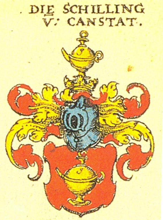 Ritterschaft und Adel in Schwaben Die Schilling von Canstatt